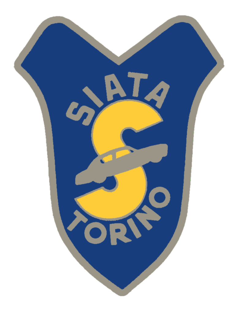 Logo du fabricant d'automobiles Siata Torino